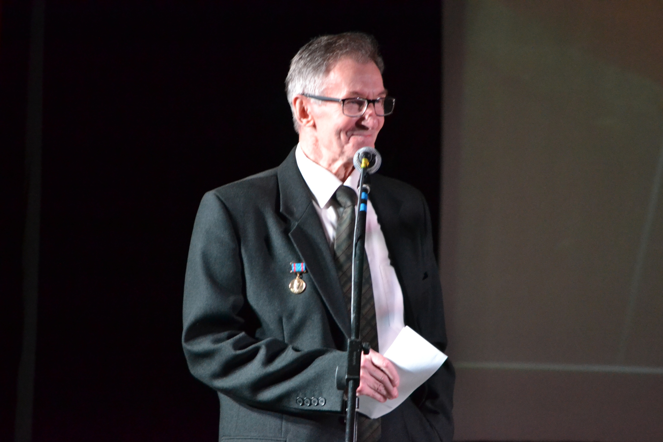 Гусев Евгений Павлович, российский поэт, прозаик, ветеран МВД: юбилейный вечер в ДК "Строитель", Ярославль (снимок фотоаппаратом)